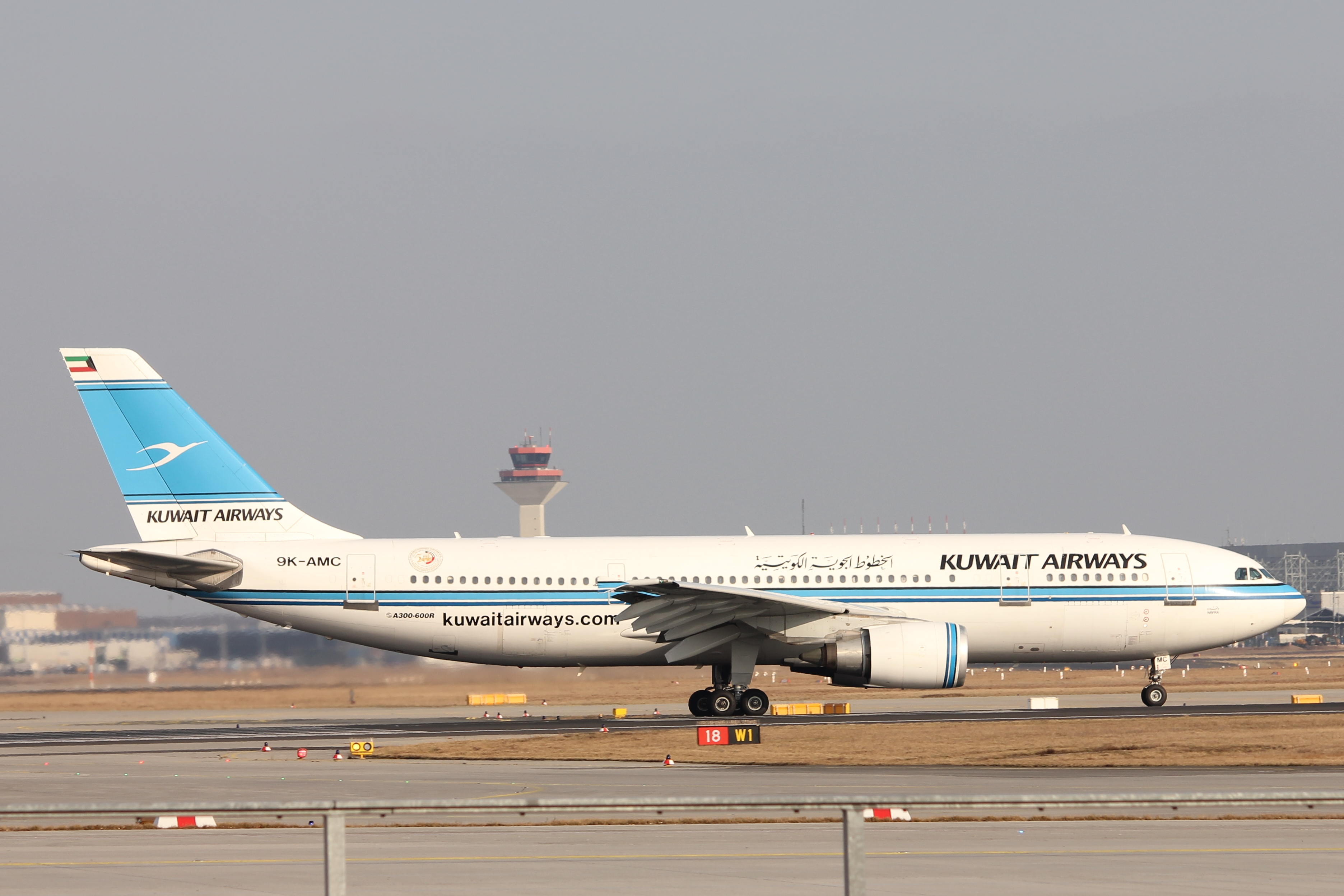 Eine A300-600 der Kuwait Airways in Frankfurt